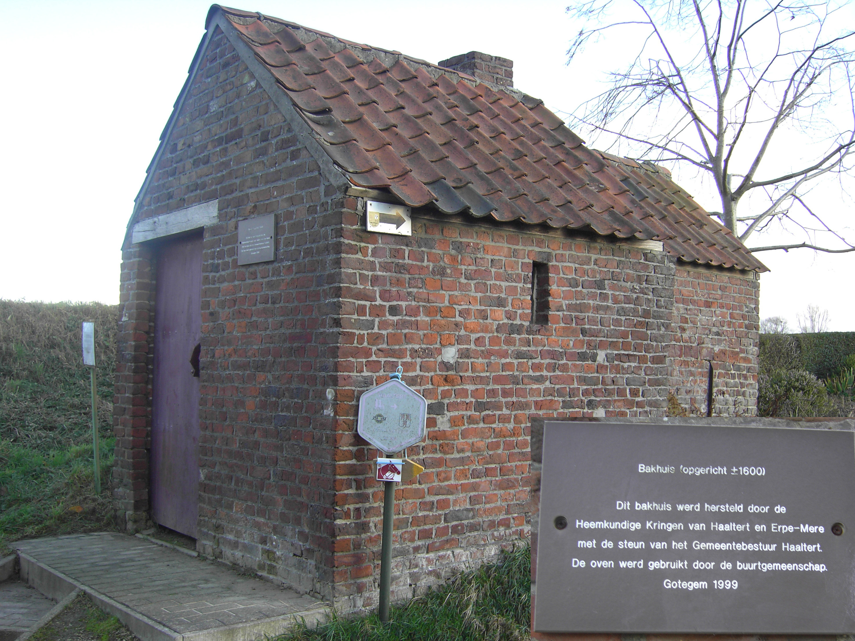 Bakoven in Gotegemstraat - grens Haaltert en Erpe-Mere - Oost-Vlaanderen - België Het markante gebouwtje is eigenlijk een bakoven die zou dateren van omstreeks 1600. Tot na WO II werd de oven beurtelings door drie families in gebruik genomen die per bakbeurt ongeveer 40 broden produceerden. Elke familie bezat een sleutel en diende zelf voor hout te zorgen. De oven werd steeds minder gebruikt en werd min of meer verwaarloosd, tot in 1999 de heemkundige kringen van Haaltert en Erpe-Mere en het Haalterts gemeentebestuur voor een grondige restauratie zorgden. Een rustbank en picknicktafel, geplaatst door de VTB-afdeling Haaltert, maken van dit plekje een uitgelezen rustpunt om te genieten van de stilte van Den Dotter. De oven is nu niet meer courant in gebruik, maar bij speciale gelegenheden worden nog ‘ovenkoeken’ gebakken.